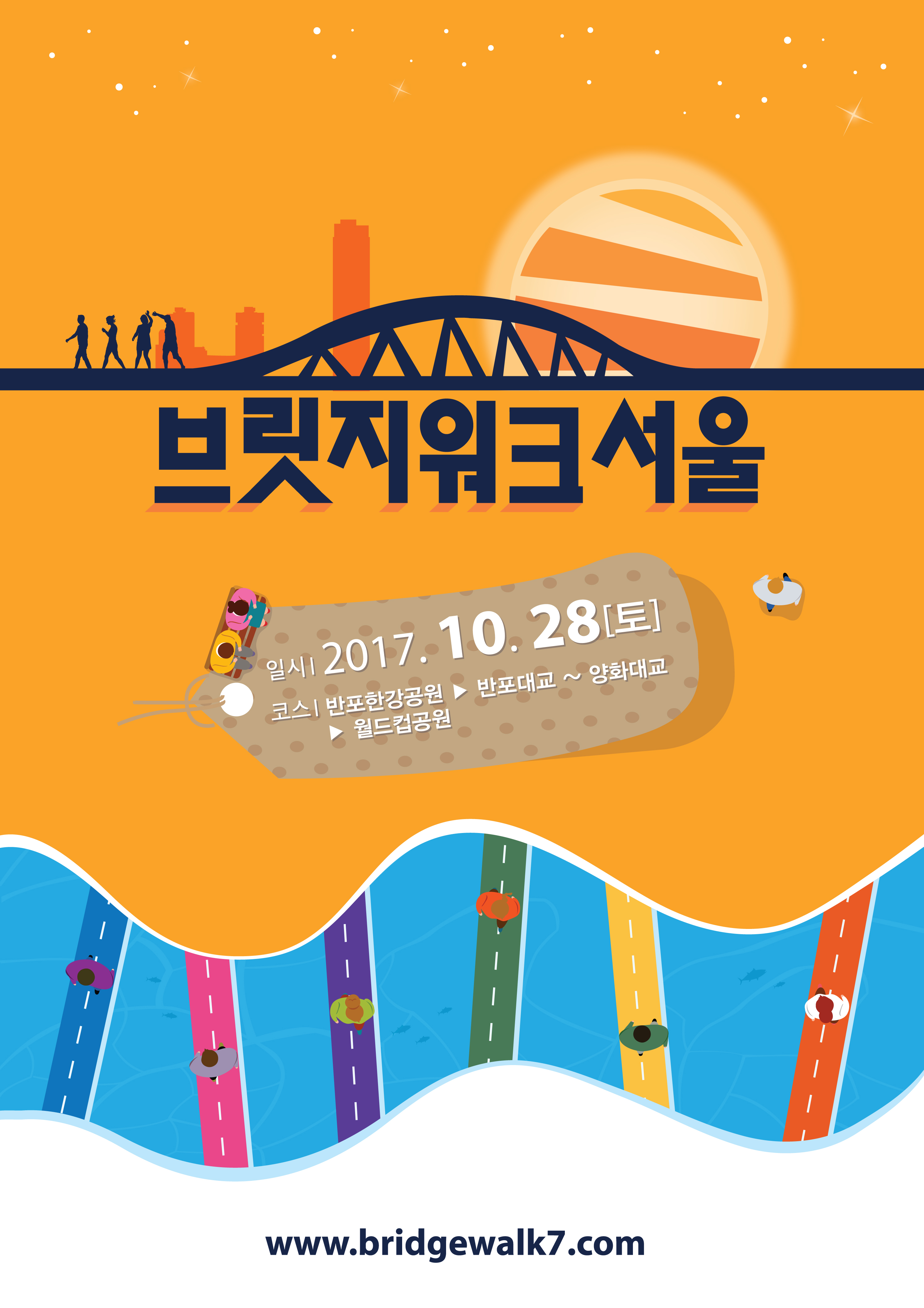 브릿지워크서울 메인포스터 이미지